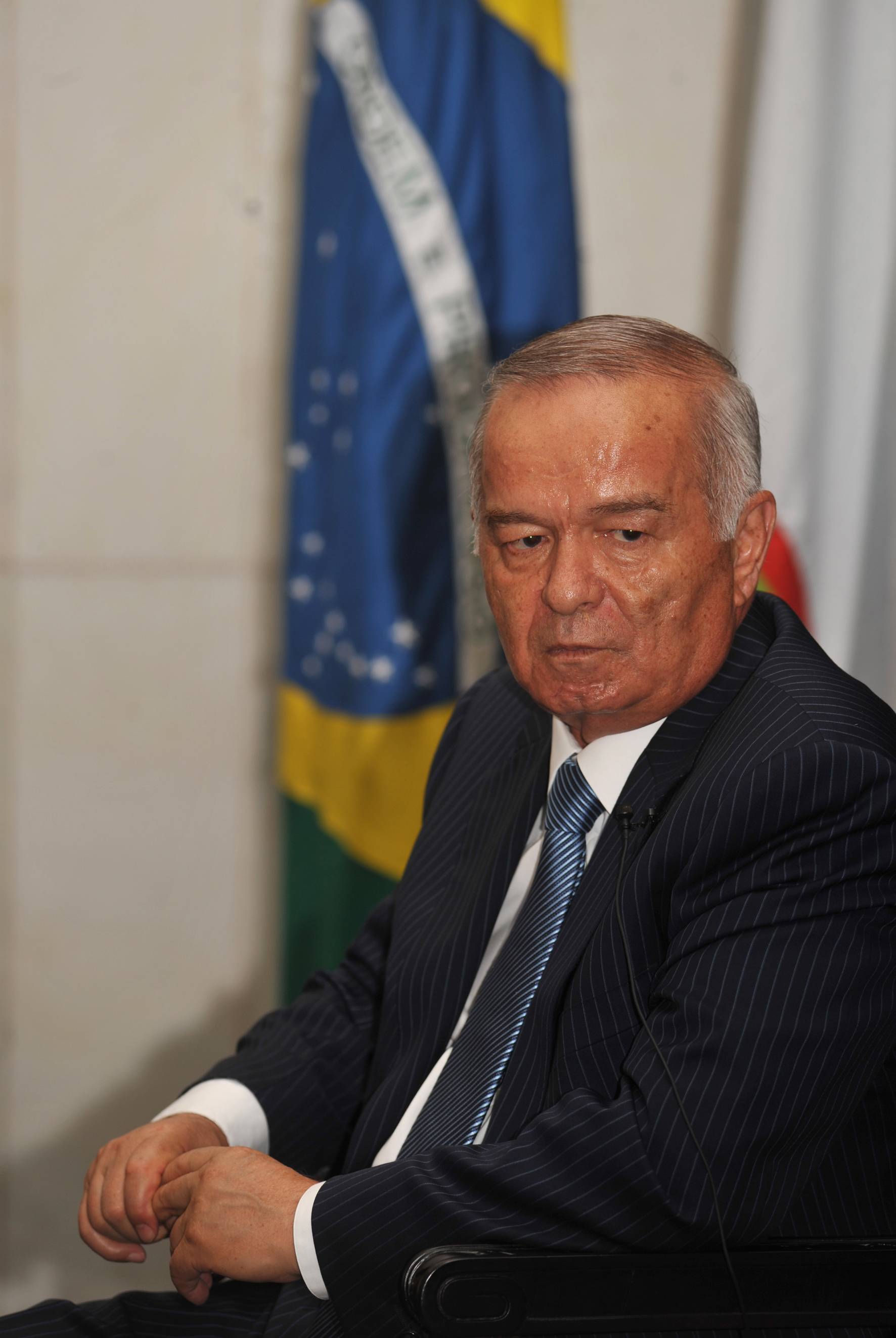 O presidente do Uzbequistão, Islam Karimov, durante visita ao Brasil